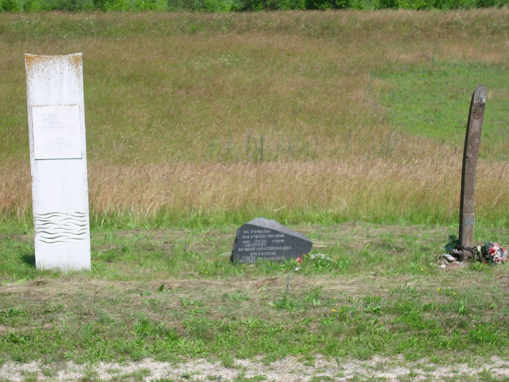 Az 1965. júnis 17.-i szakítás emlékművei a szakítás helyszínén Kulcsodnál.